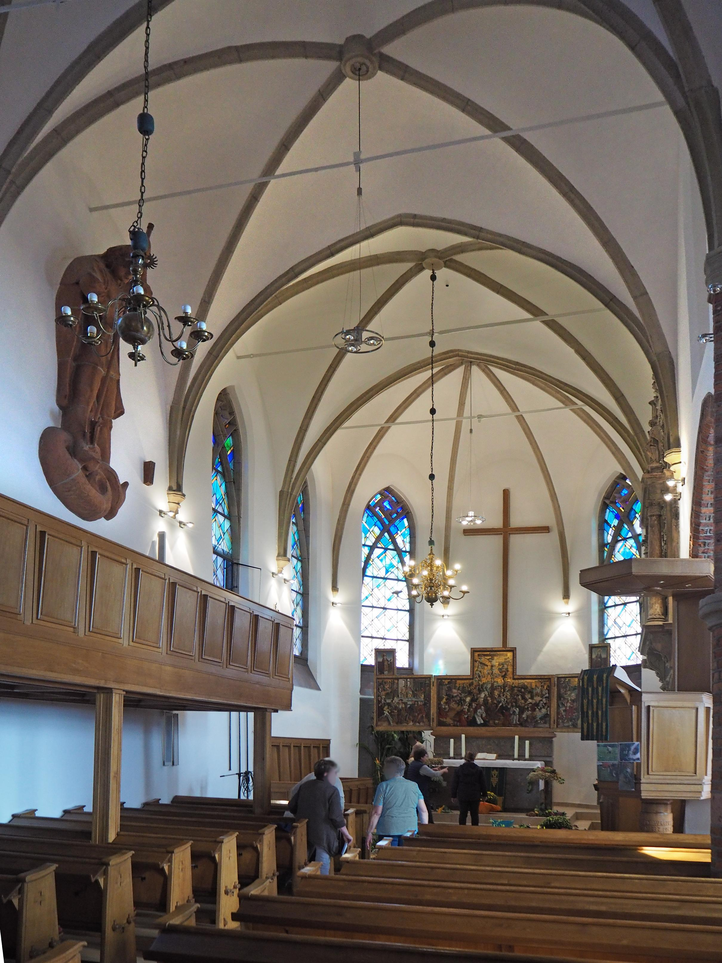 Schermbeck - St. Georgskirche - Inneres - Foto von 2015